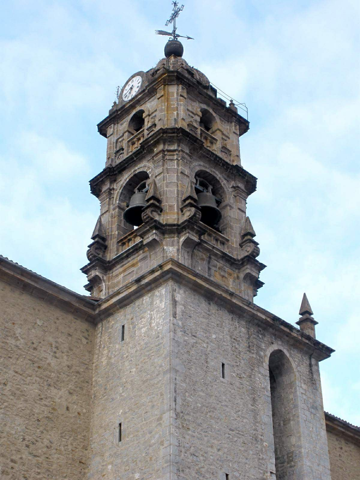 Iglesia de Santa Marina de Oxirondo, Bergara (Gipuzkoa)